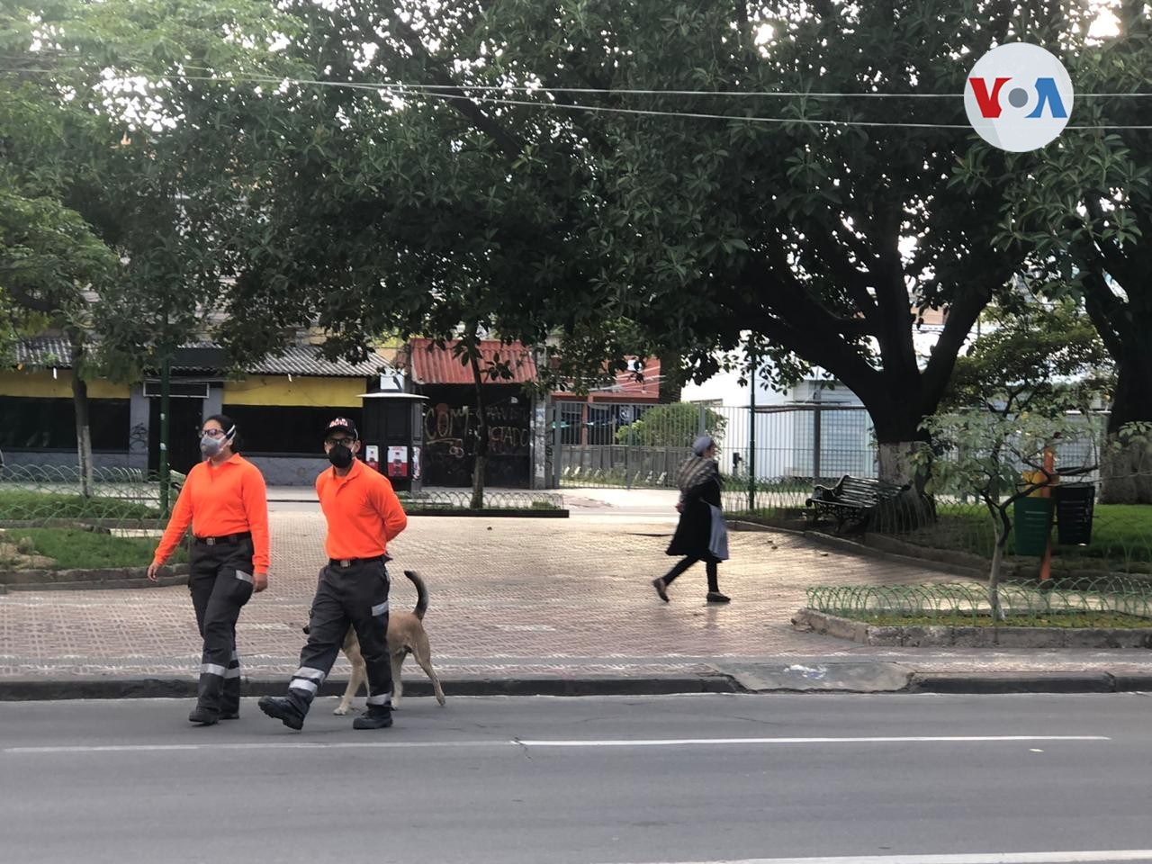 La Paz durante la cuarentena anti COVID-19